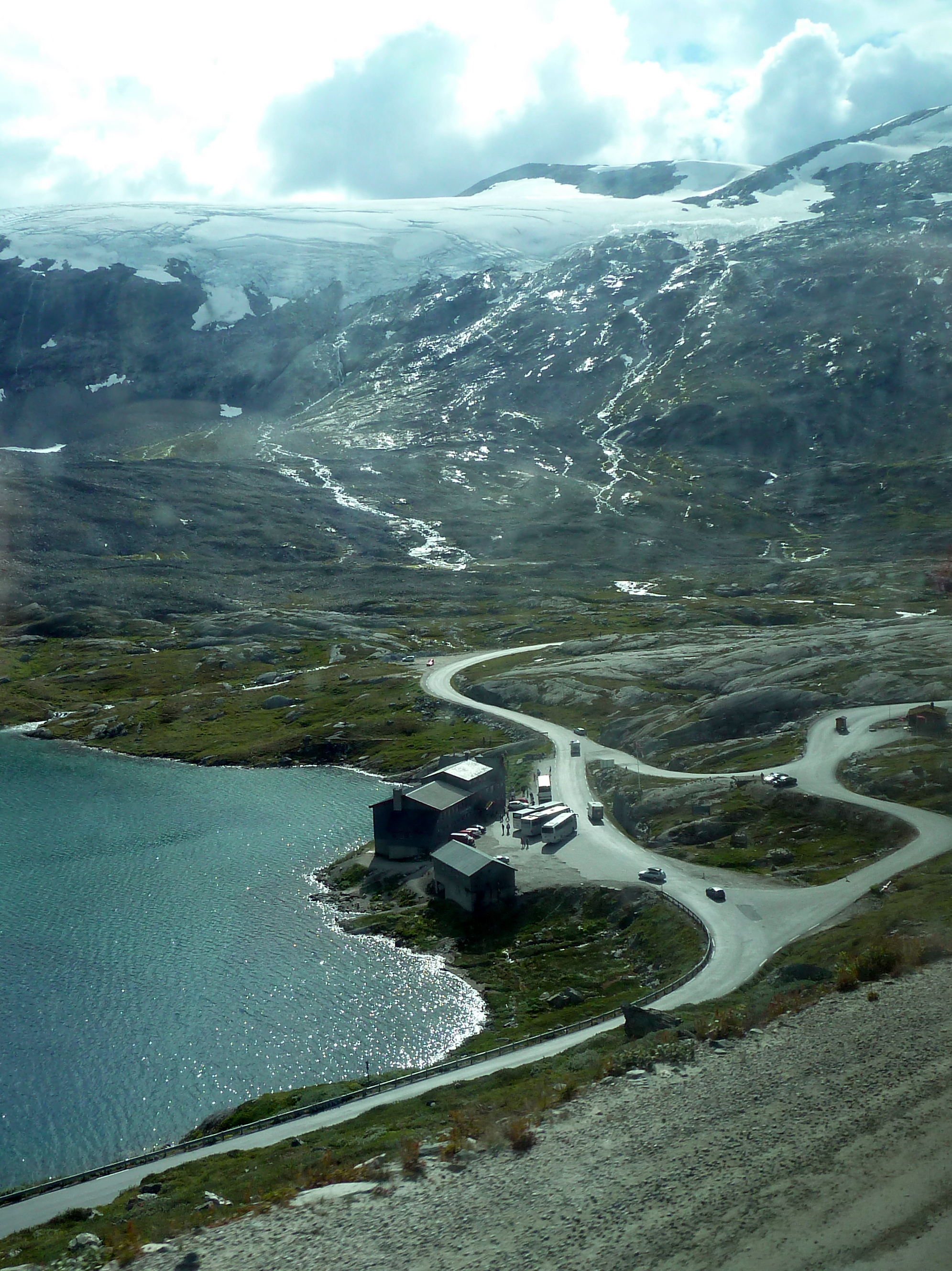 der Djupvatnetsee mit Gletscher und der Djupvasshytta von der Dalsnippa-Mautstraße aus